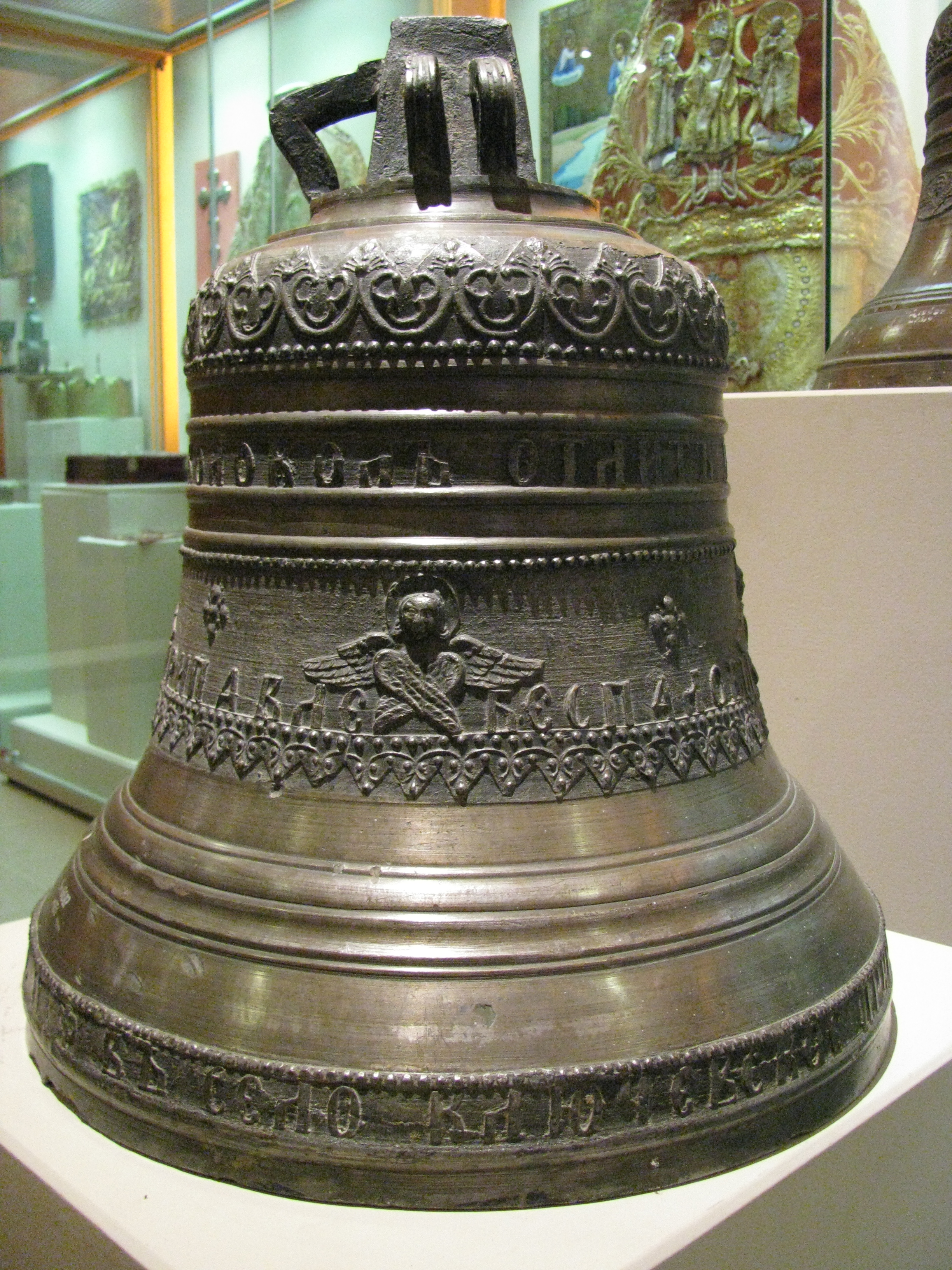 Колокол